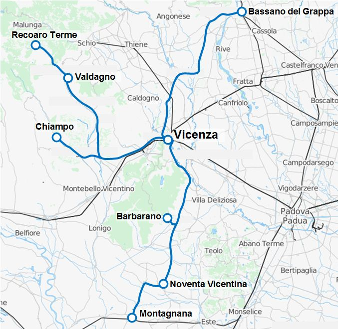 La rete delle tranvie gestite dalla FTV